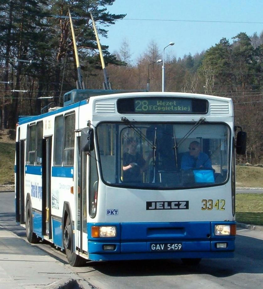 Trolejbus Jelcz PR110E #3342. Wykonay przez firmę KPNA ze Słupska w 1988 roku.